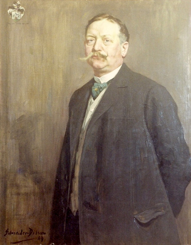 Abb. in: Margot Klütsch (Bearb.), Die Sammlung von Wille im Haus Beda Bitburg, Mus. Kat., Bitburg 1992, S. 15.